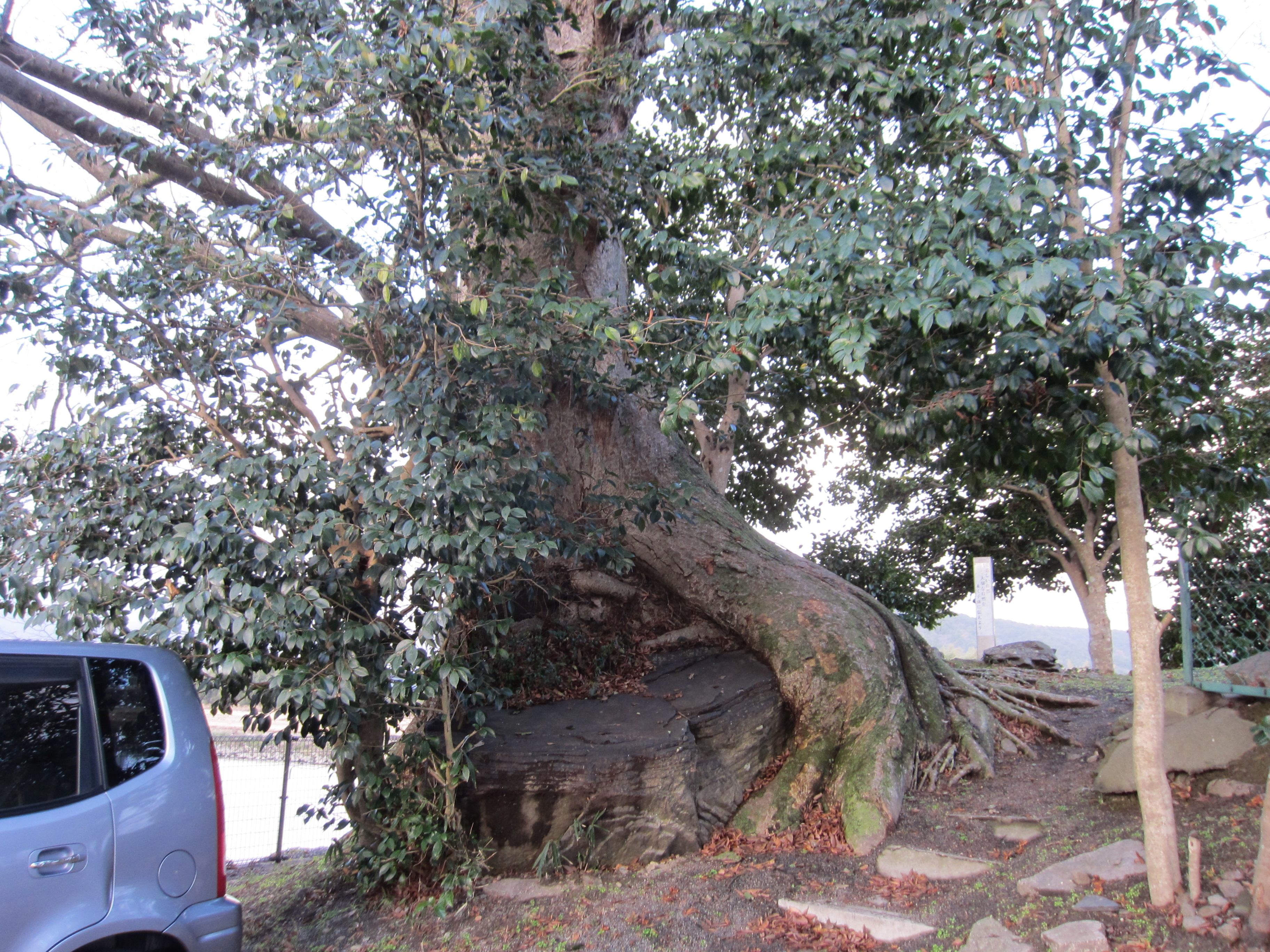 住吉神社 (南丹市) 御旅所大ケヤキ